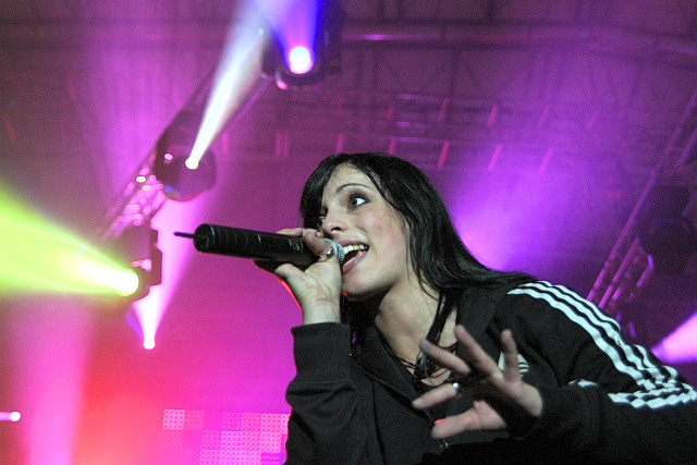 Sängerin Stefanie Kloß der Formation Silbermond